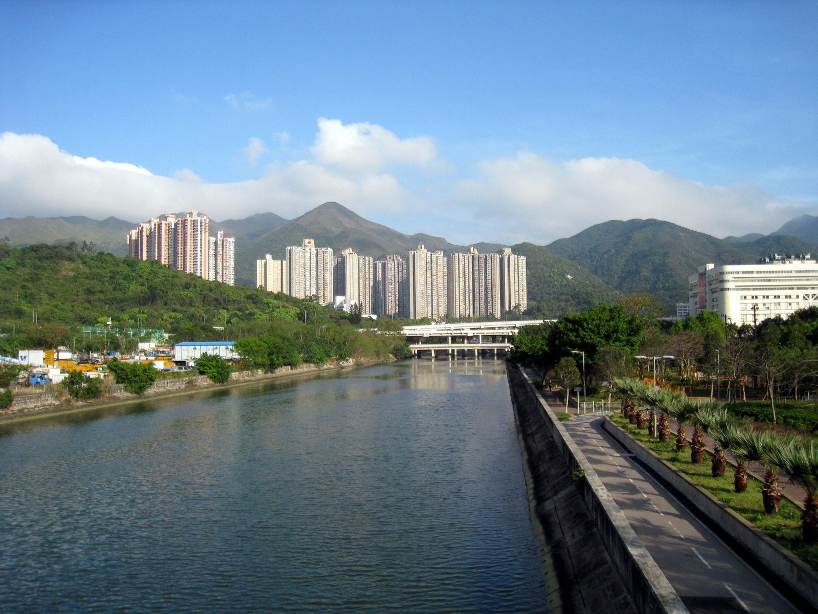 小瀝源渠 HK Siu Lek Yuen River